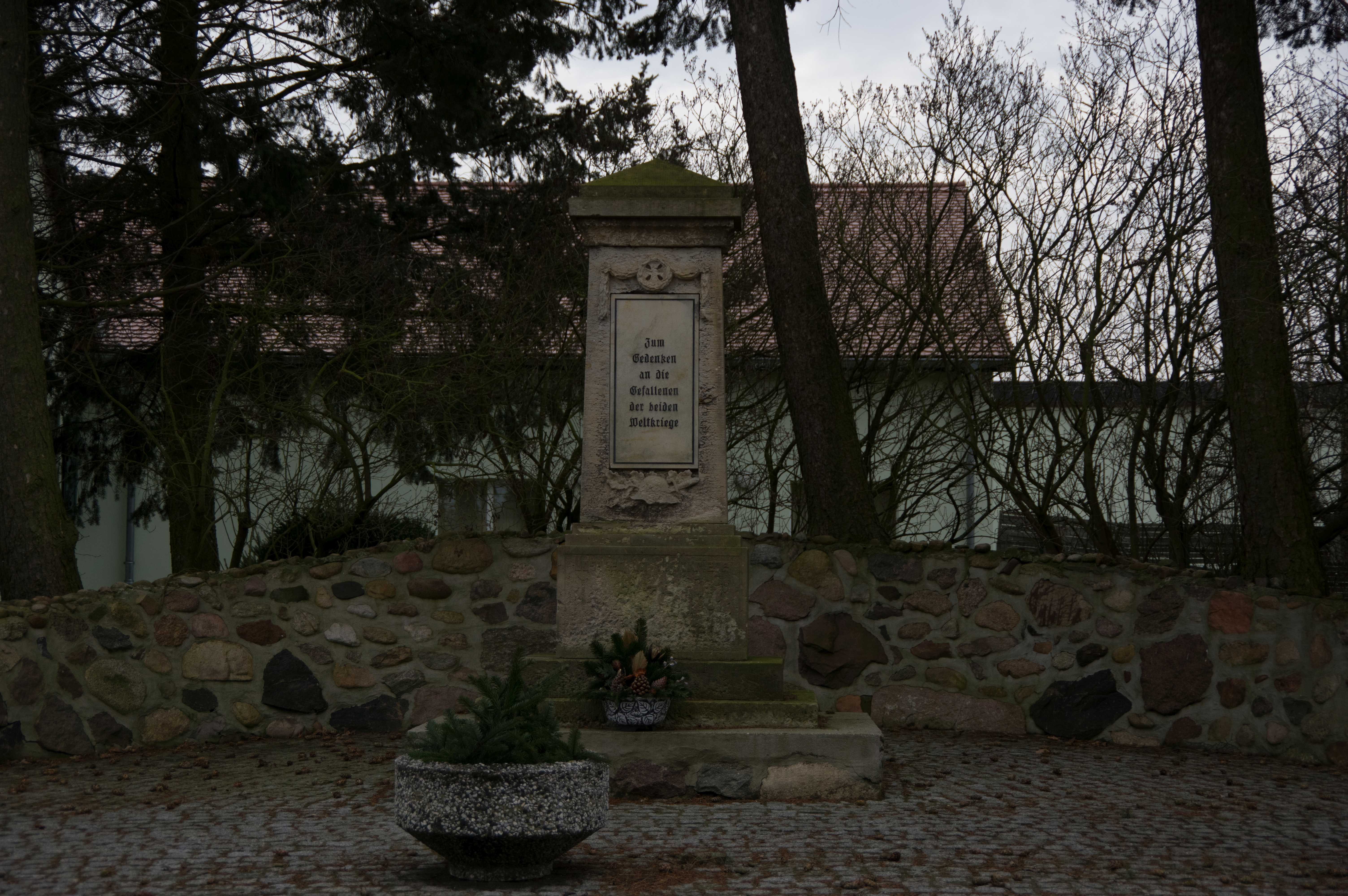 Genthin, Ortsteil Schopsdorf in Sachsen-Anhalt. Das Kriegerdenkmal in der Nähe der Feuerwehr.